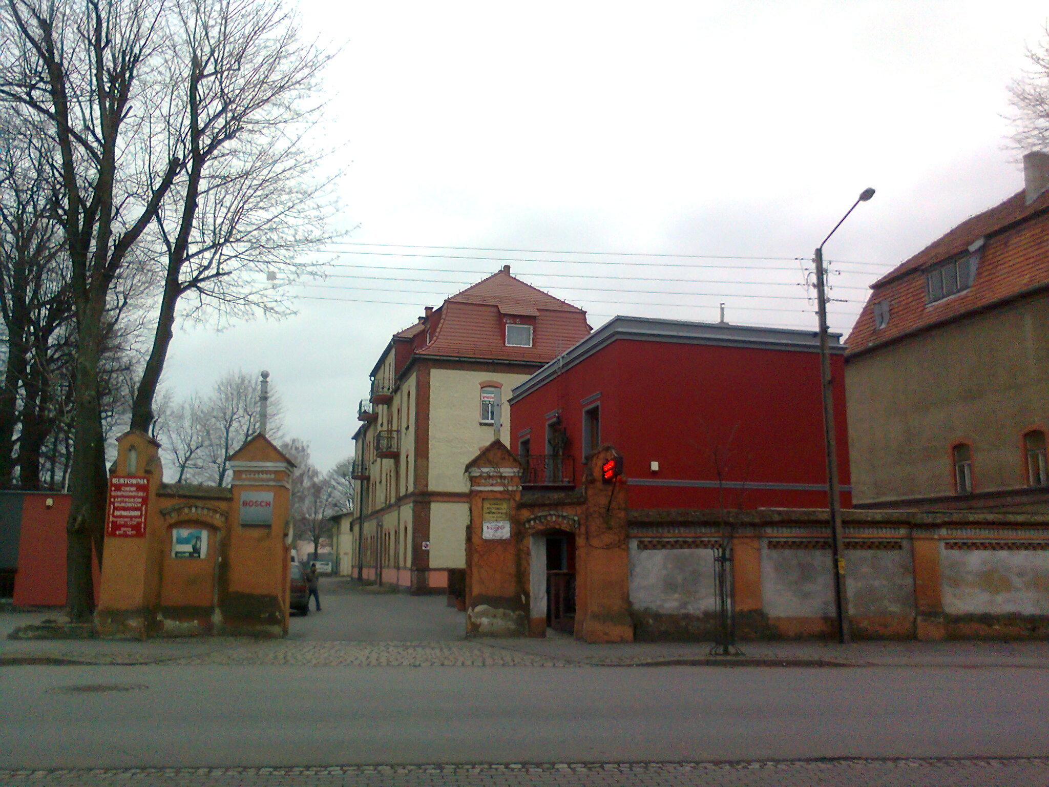 Głubczyce, brama wjazdowa do byłych koszar od ul. Żeromskiego